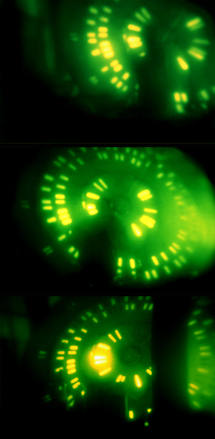 Titel: Ufo (Tryptichon Fotografie)